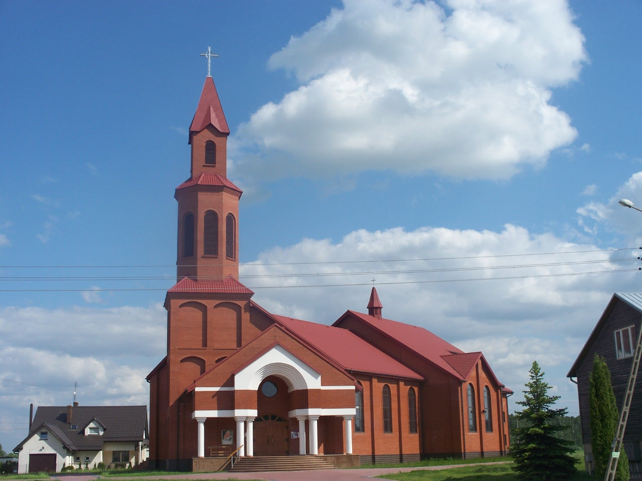 Kościół pod wezwaniem św. Ap. Piotra i Pawła w Wysokiem Mazowieckiem.